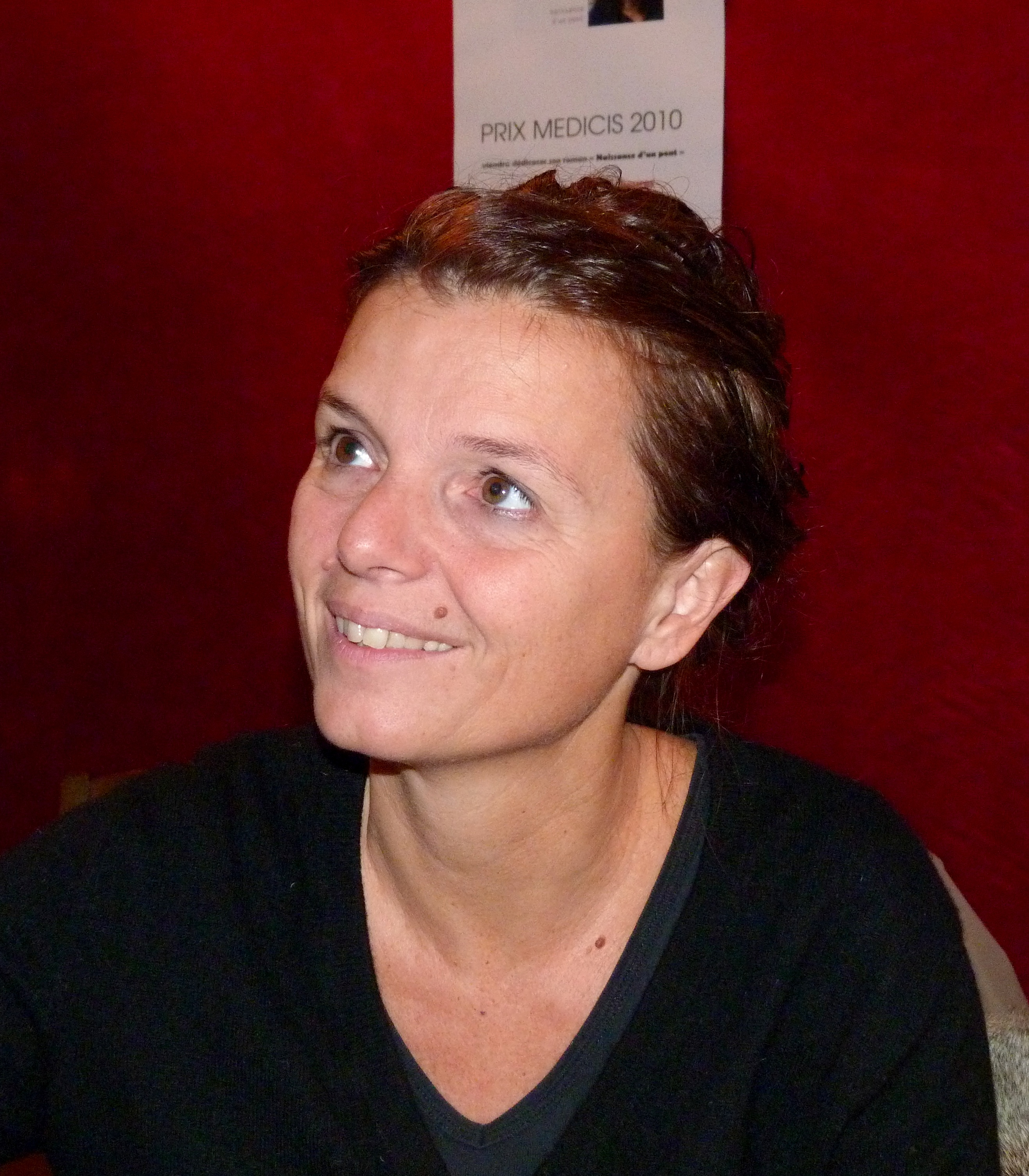 Maylis de Kerangal, lors d'une signature, le 14 novembre 2010, pour son livre Naissance d'un pont, prix Médicis 2010.